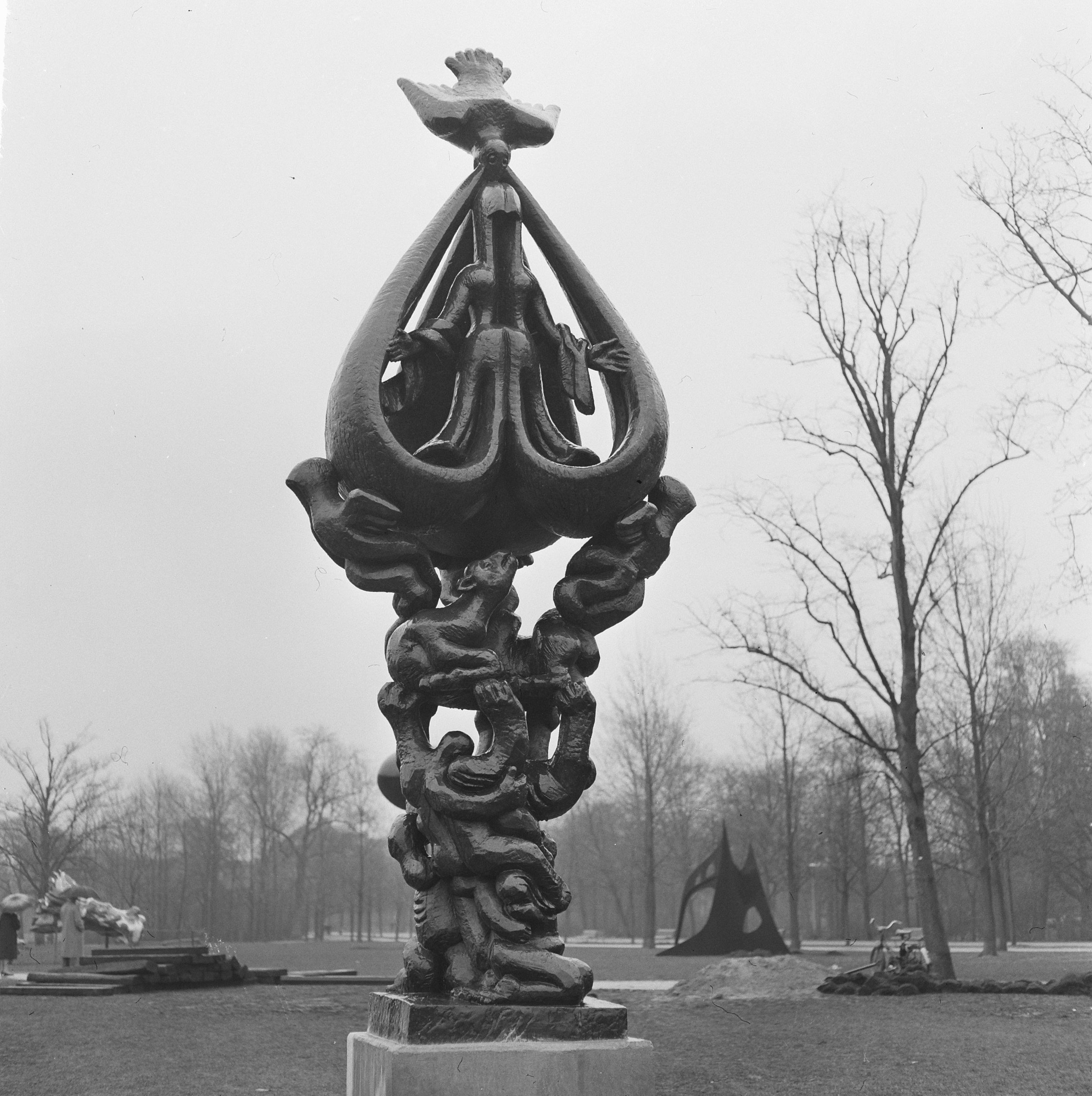 Collectie / Archief : Fotocollectie Anefo Reportage / Serie : [ onbekend ] Beschrijving : Beeldententoonstelling in Vondelpark (t.g.v. 100-jarig bestaan) "Between heaven and earth" van J. Lipchitz Datum : 29 maart 1965 Locatie : Amsterdam, Noord-Holland, Vondelpark Trefwoorden : Beelden, tentoonstellingen Persoonsnaam : J. Lipchitz Fotograaf : Kroon, Ron / Anefo Auteursrechthebbende : Nationaal Archief Materiaalsoort : Negatief (zwart/wit) Nummer archiefinventaris : bekijk toegang 2.24.01.03 Bestanddeelnummer : 917-5870